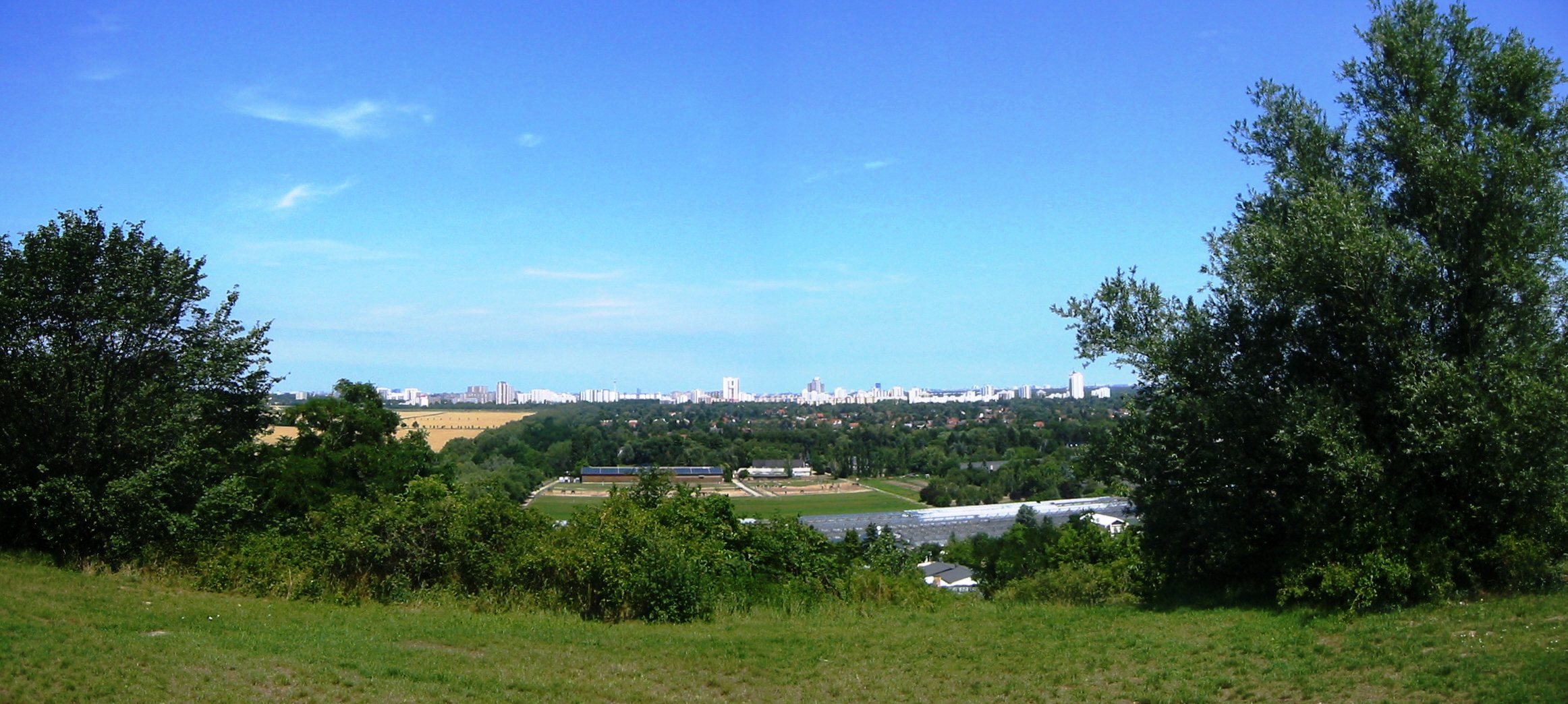 Blick vom Trümmerberg "Dörferblick" in Rudow nach Mitte